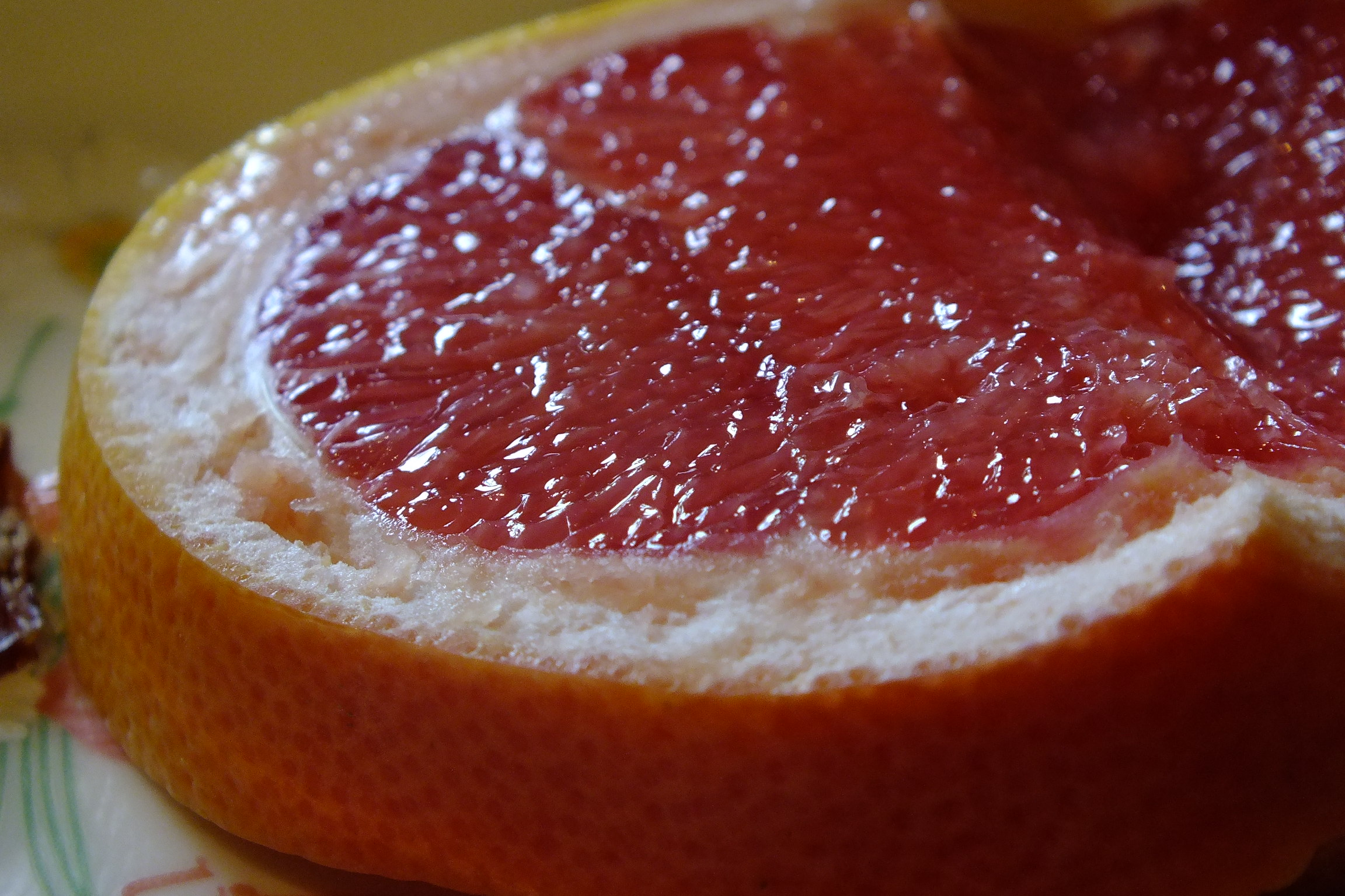 2017-02-26 Pink Grapefruit Ruby グレープフルーツ スタールビー 果肉が濃い赤色をしていて、果皮は黄色または少しオレンジがかった色。ホワイト種に比べると苦みと酸味は少なめで、甘味がやや強いのが特徴。